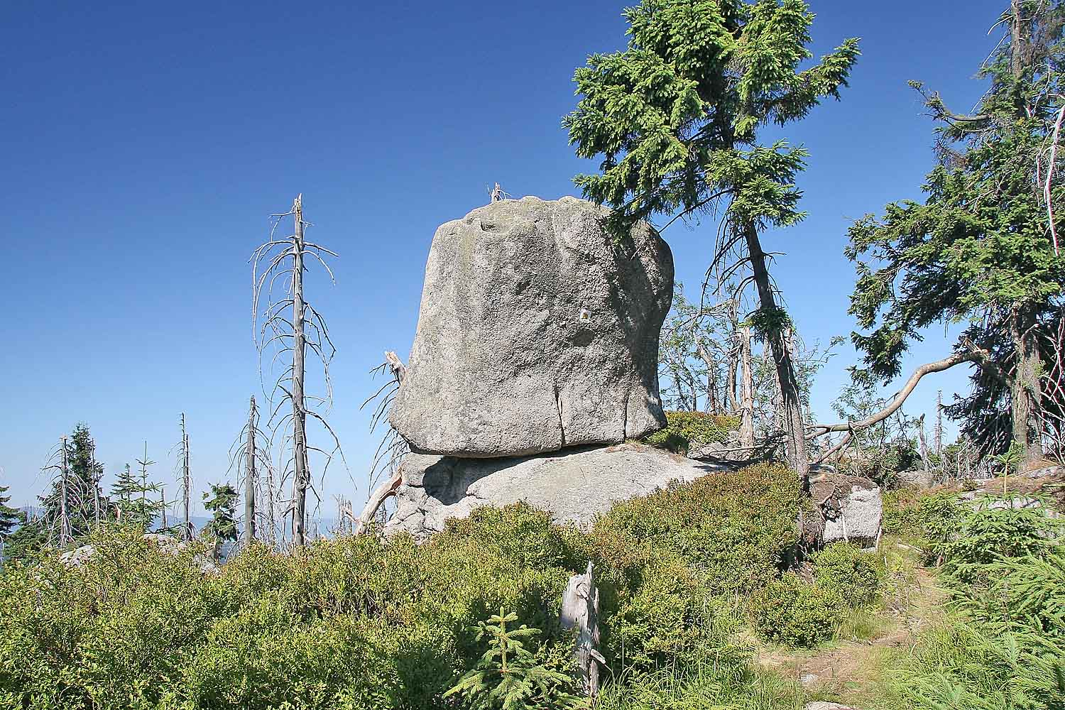 Skalní útvar Čertův odpočinek, Jizera Mountains, district Liberec, Czech Republic autor: Prazak date: 19. 7. 2006